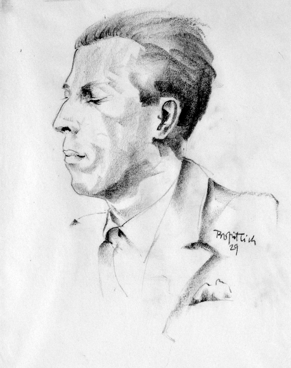 Erwin Linder, Bleistift, aus einer Serie von Schauspielern in ihren Rollen am Bonner Theater